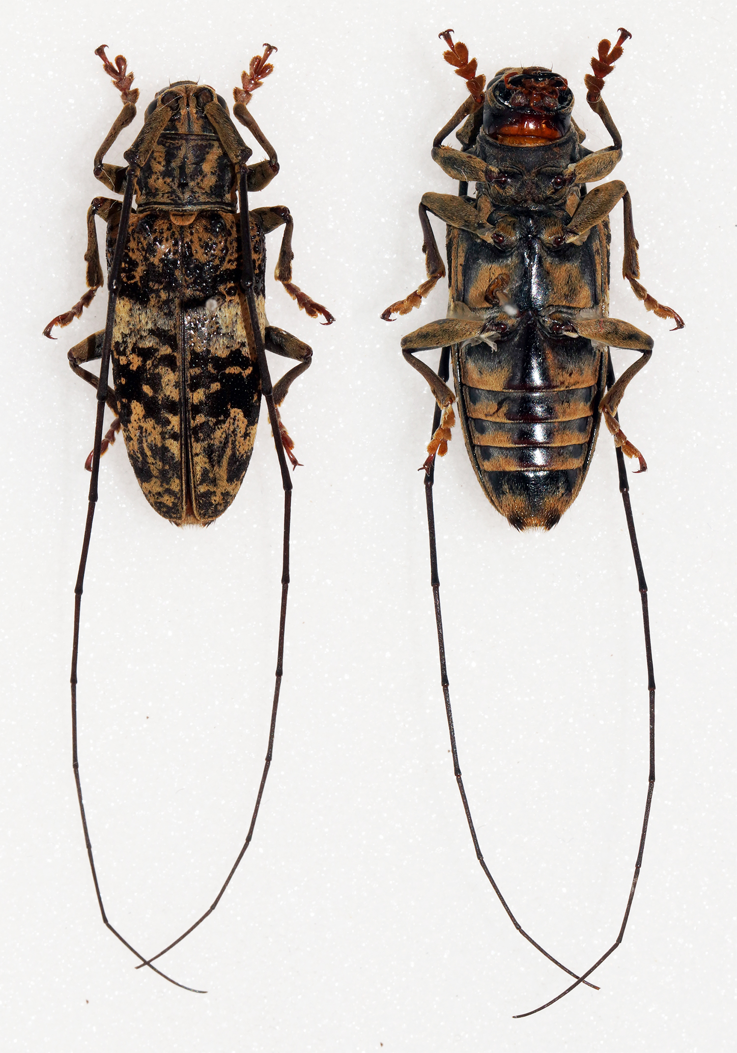 Gahan,1888 Sex: Male Data: 06-2014 - Tam Dao NP - Vinh Phuc Prov - 1000m - North Vietnam Size: 22mm